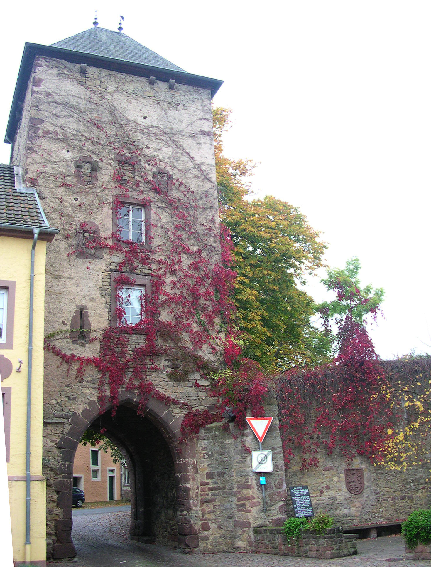 Dudeldorf, Obertor